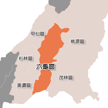 六龜區相對位置